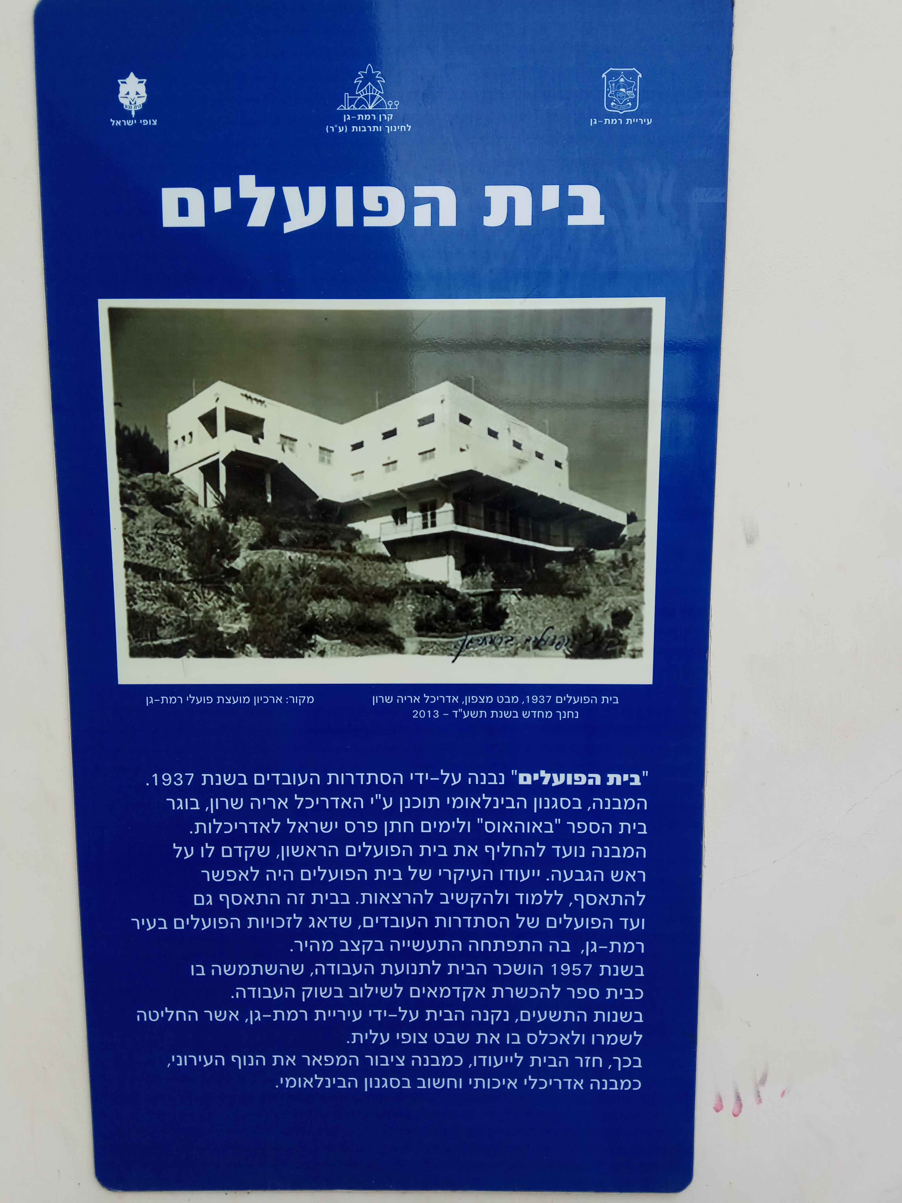 שלט הסבר בבית מועצת פועלי רמת גן לשעבר, מעלה הצופים 14.